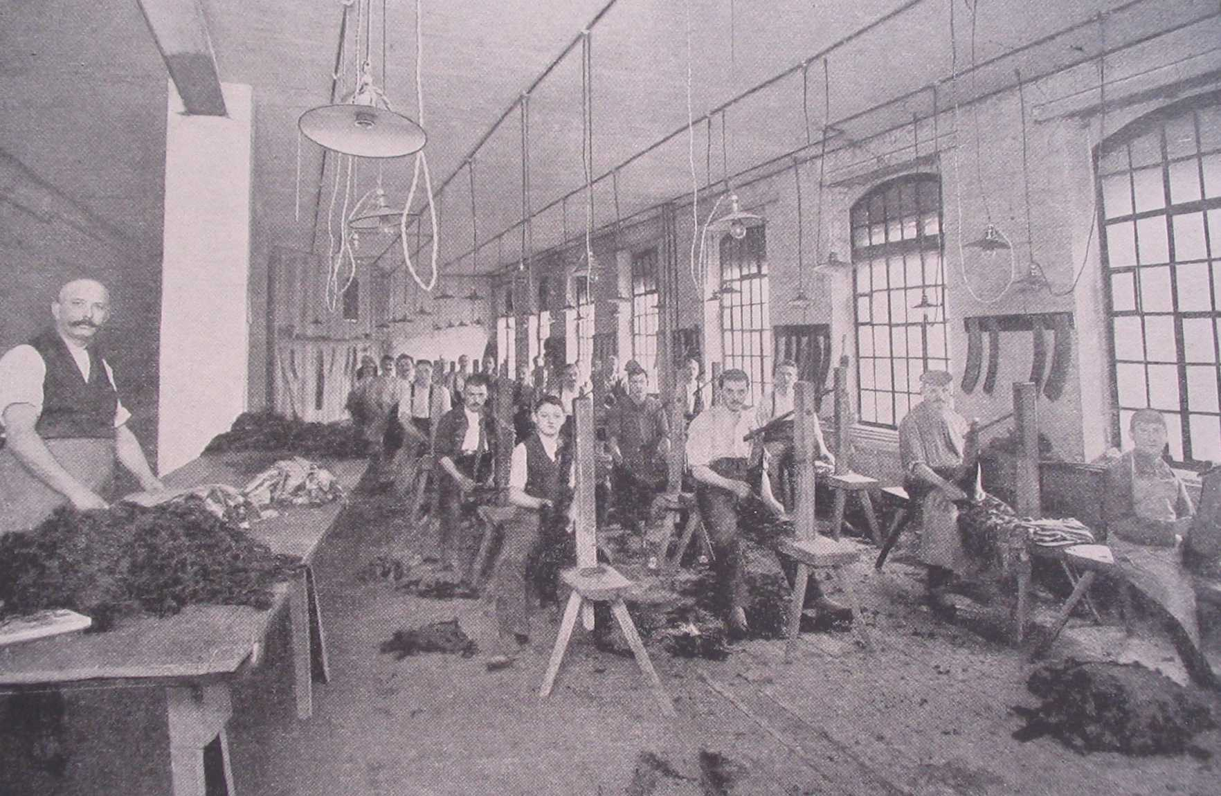 300 Jahre Familie Thorer - 50 Jahre Theodor Thorer. Seite 51. Astrachan-Zurichterei. Leipzig-Lindenau.